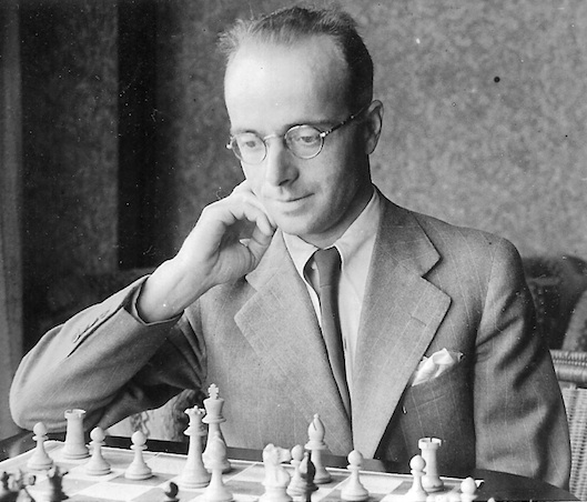 Barbato Rometti